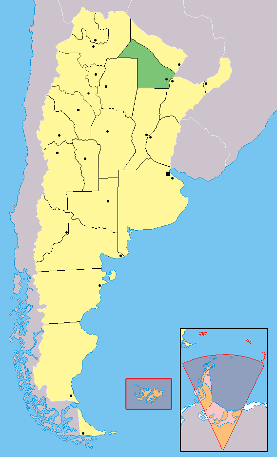 Mapa de la Provincia del Chaco, Argentina.